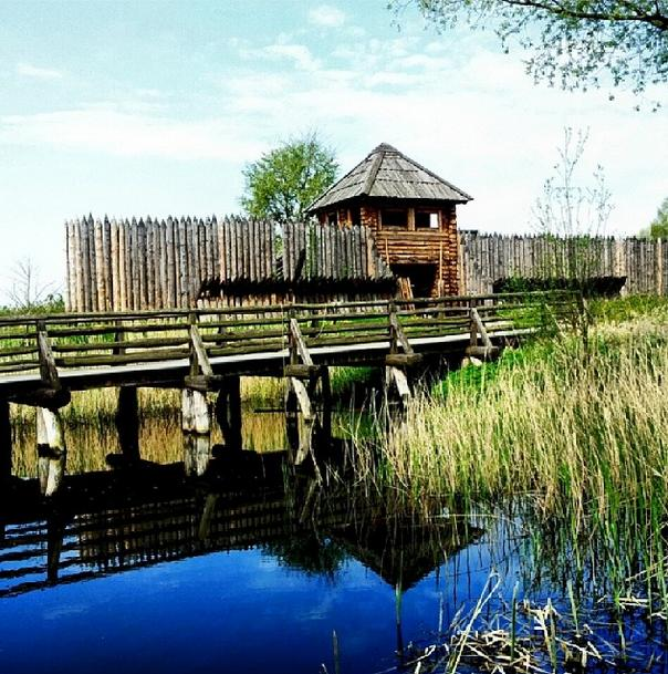 Kalisz